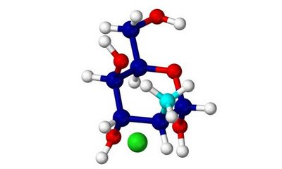 polimero en solucion